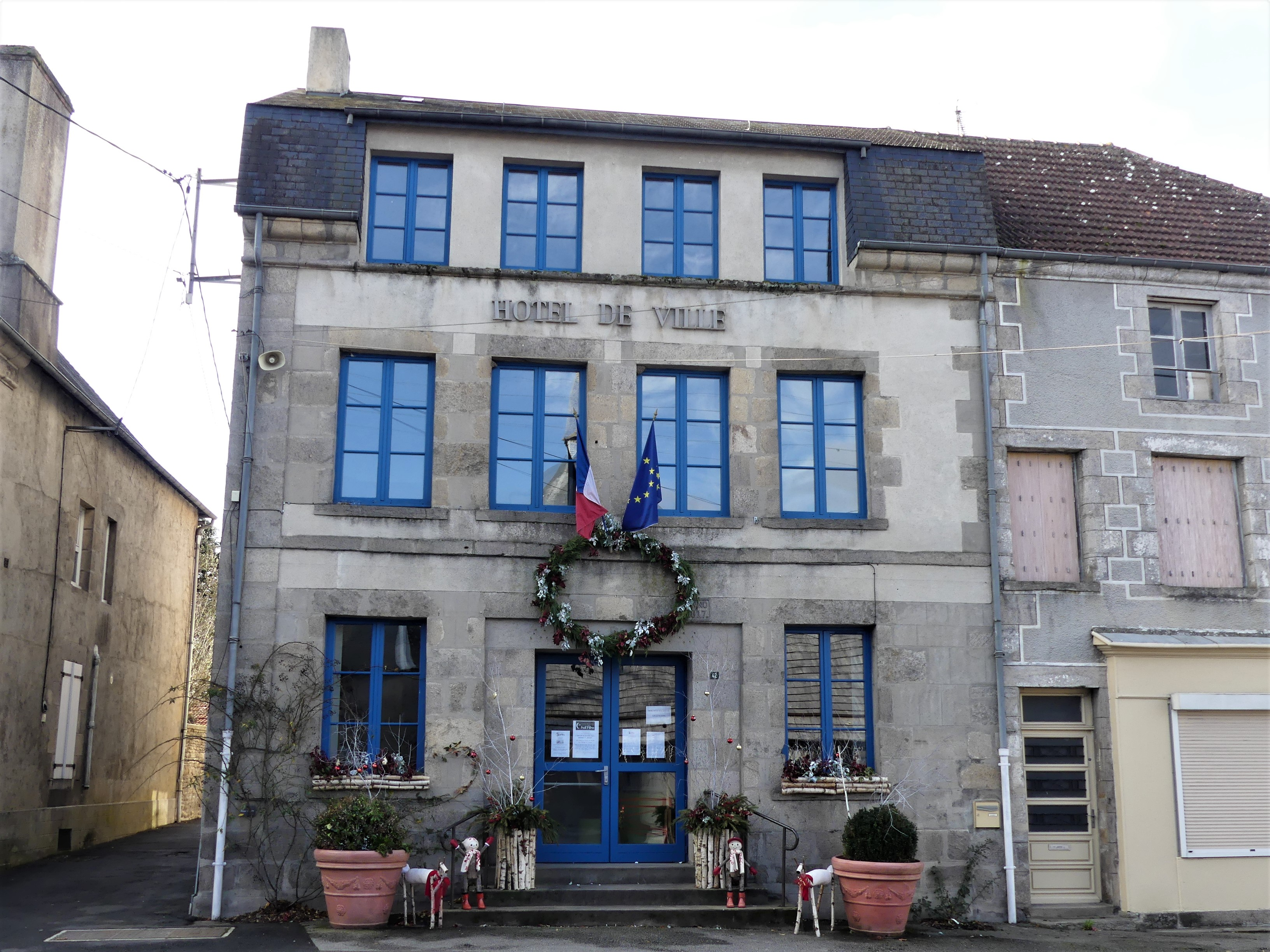 L'hôtel de ville de Jarnages, Creuse, France.